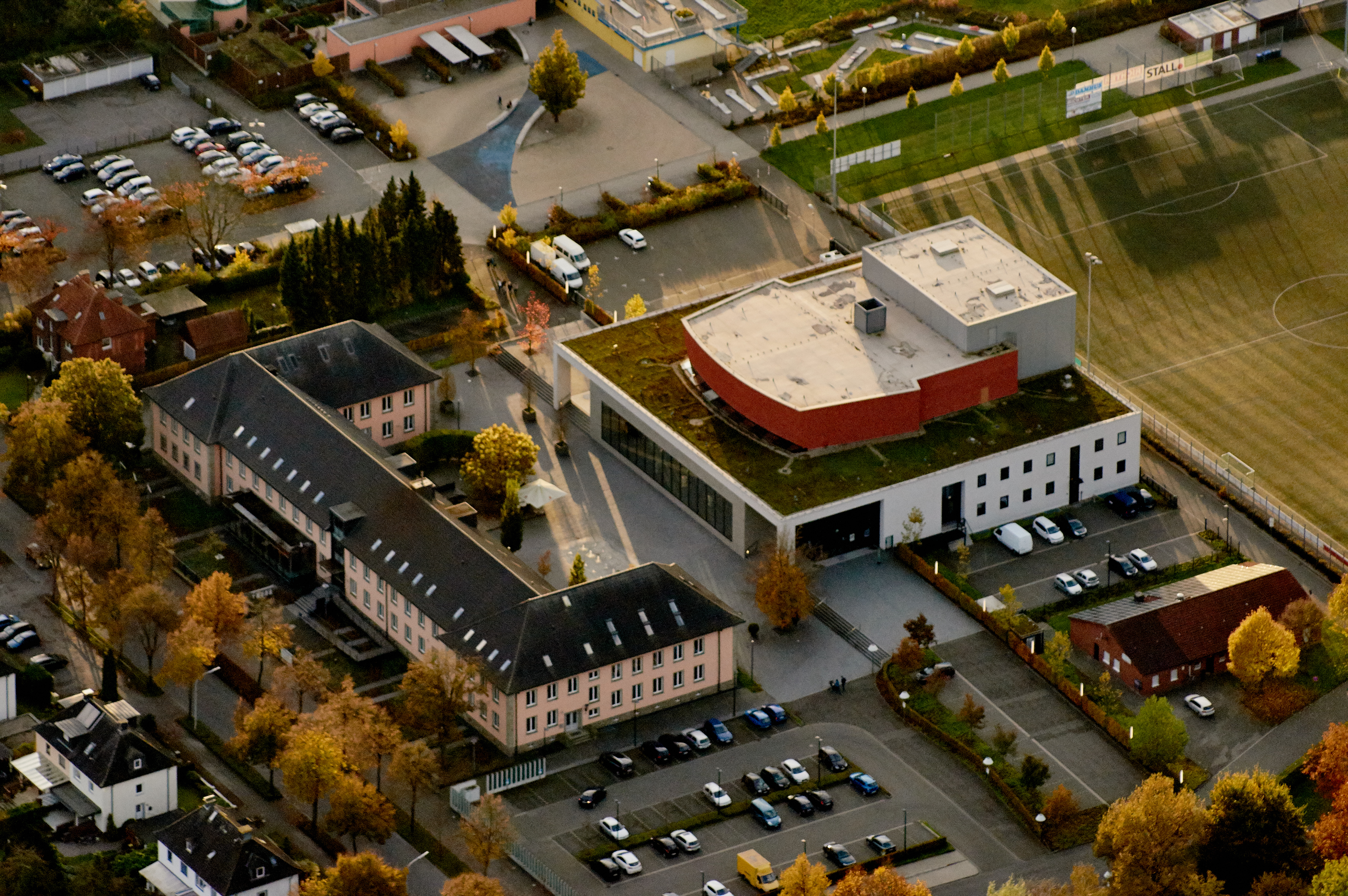 Konzert Theater Coesfeld mit WBK, Coesfeld, Nordrhein-Westfalen, Deutschland.